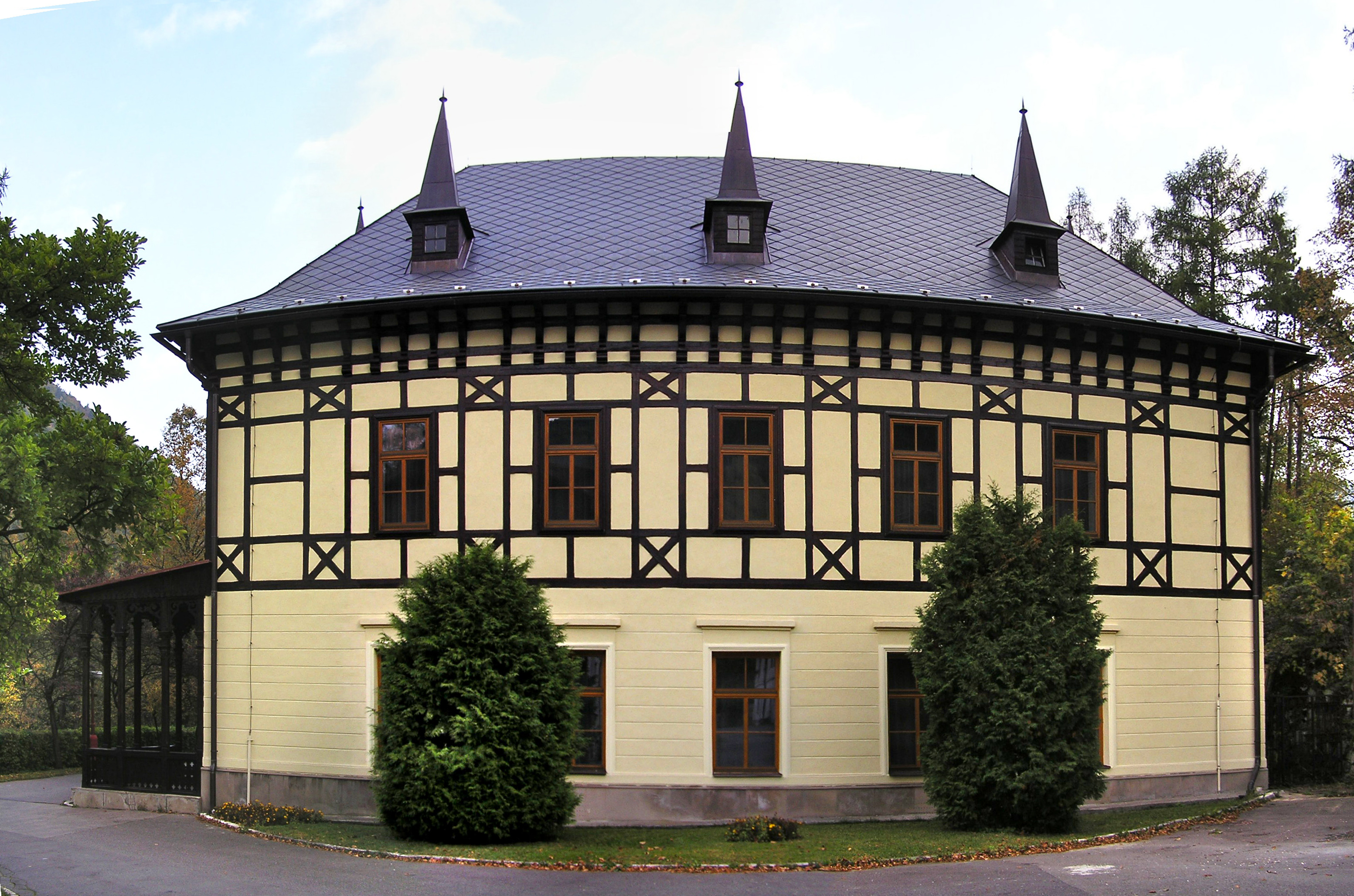 Dom kúpeľný, Kollárov dom, Ľubochňa, okres Ružomberok.